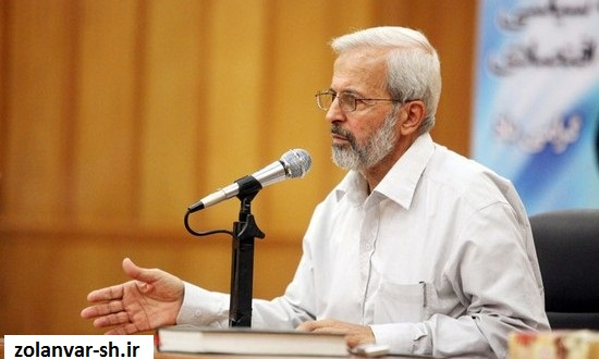 مهندس سید حسین ذوالانوار